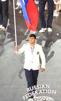 Хаджимурат Гацалов с флагом России на церемонии отрытия I Европейских игр в Баку